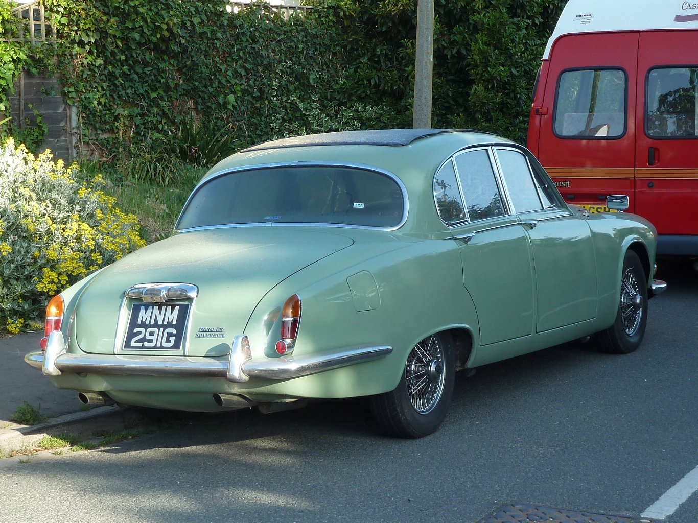 1969 Daimler Sovereign(DVLA) first registered 10 July 1968, 4235cc